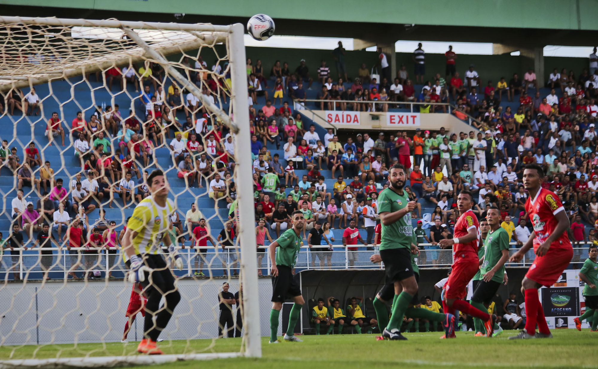 Fotos: Gleilson Miranda/Secom